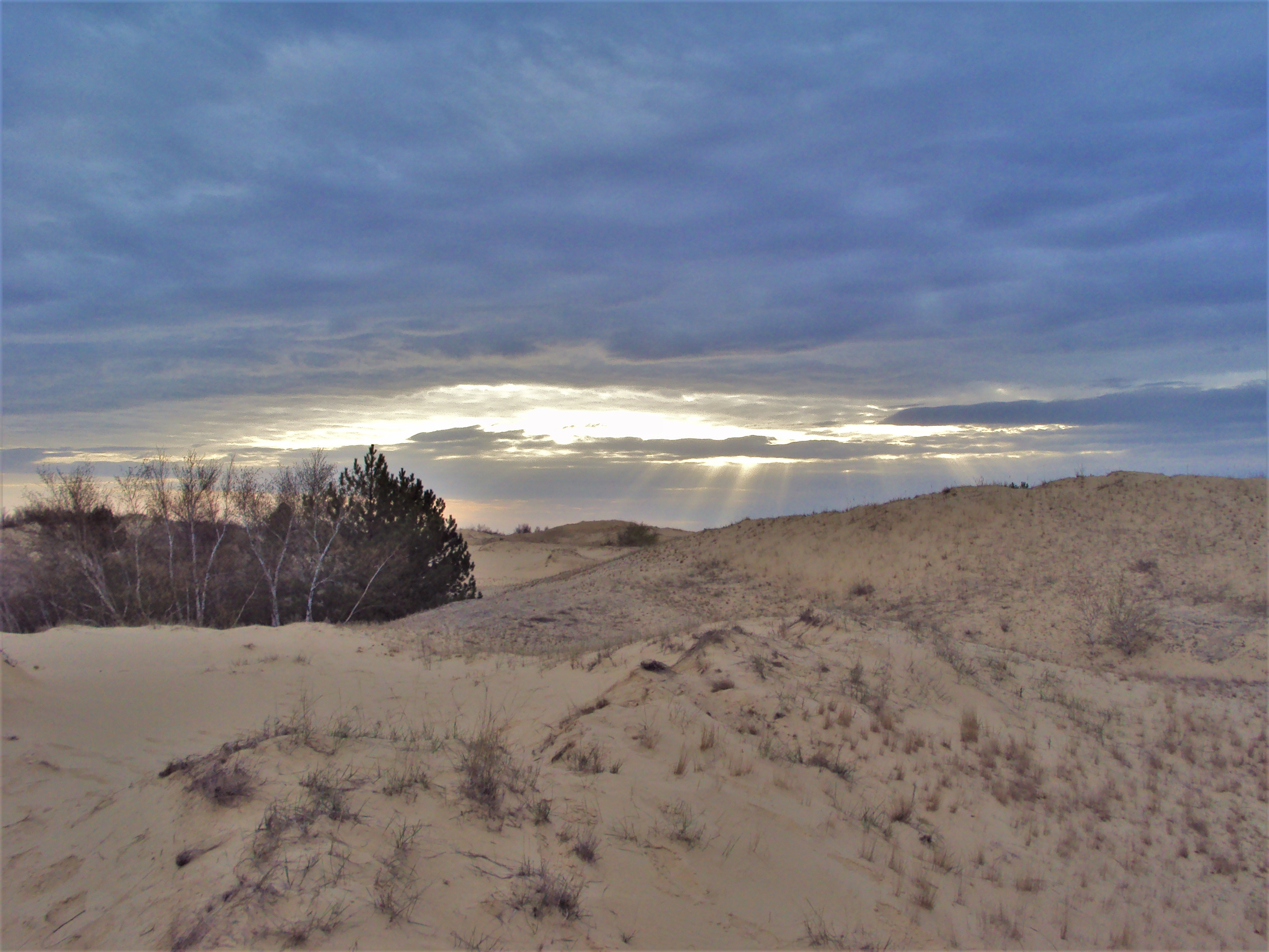 Закат в Олешковских песках